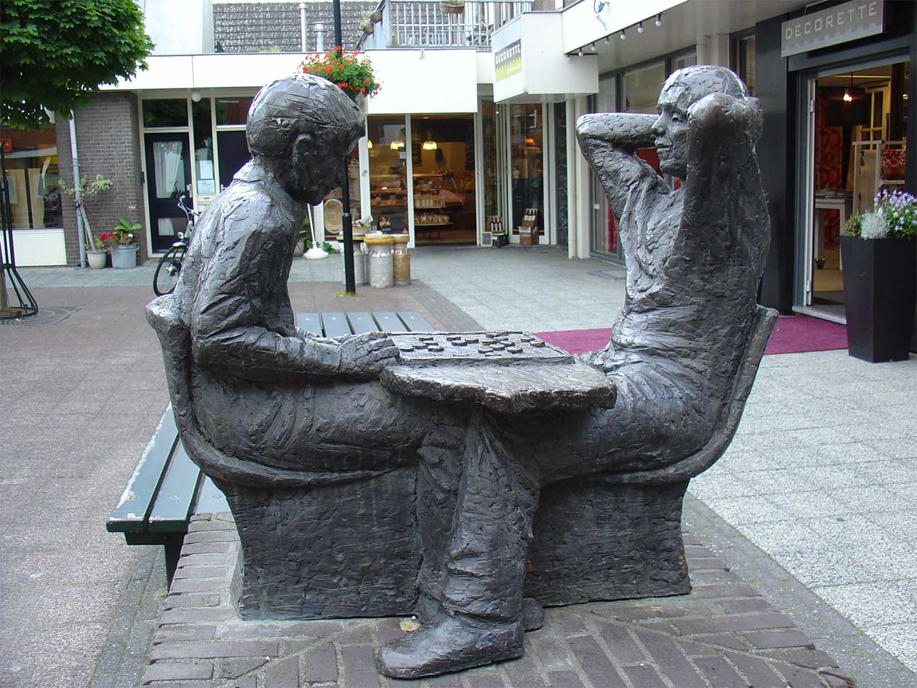 De dammers uit 1984 door Roel Bendijk - H.B. Nederbergplein Bergambacht